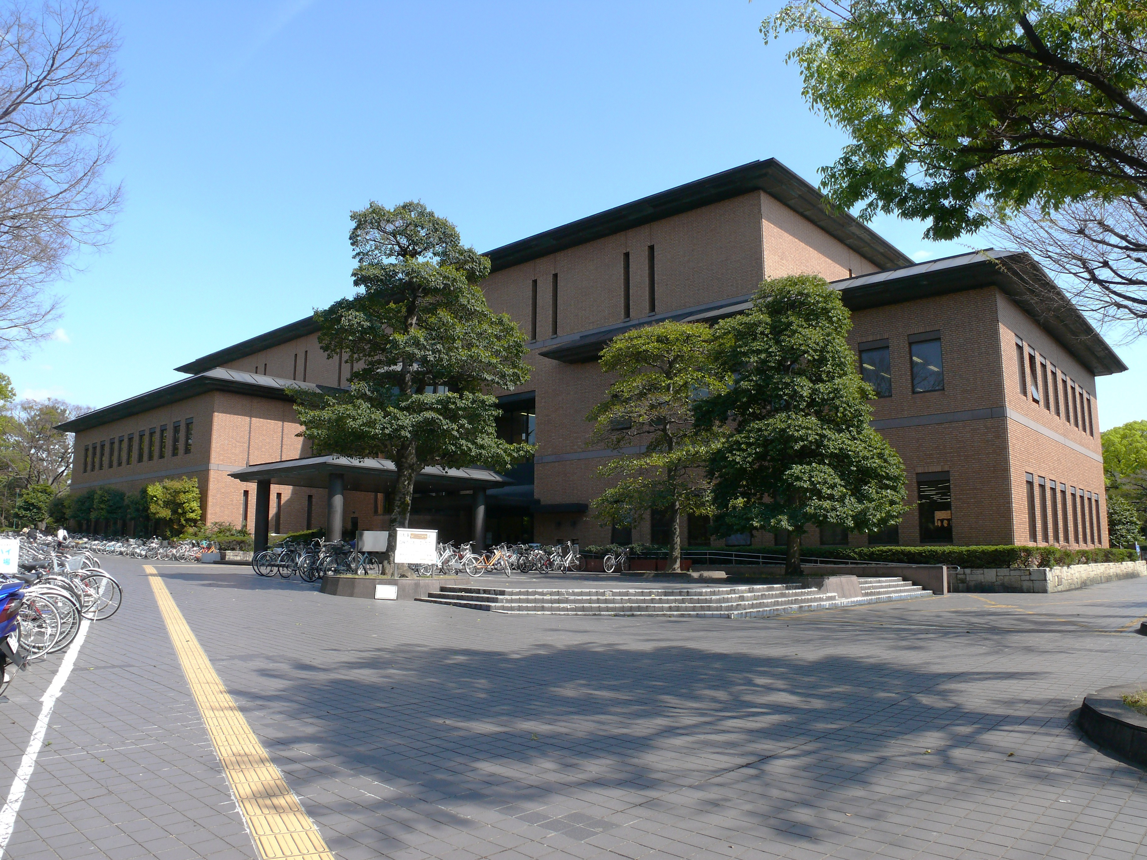 日本の愛知県名古屋市中区鶴舞（つるまい）の鶴舞（つるま）公園内にある名古屋市立鶴舞（つるまい）中央図書館